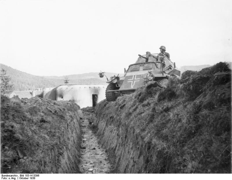 Scherl Bilderdienst: Aus dem befreiten Sudetenland, Betonbunker der Schöberlinie mit duetschen Strassenpanzerwagen bei Karlsbad. Photo Wag[ner], [herausgegen am 7.Oktober 1938] 13247-38